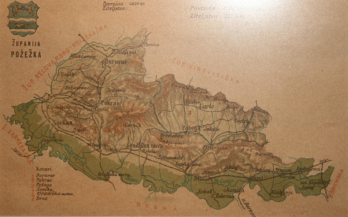 Zemljovidi županija na razglednicama oko 1900. godine , snimljeno tijekom Noći muzeja